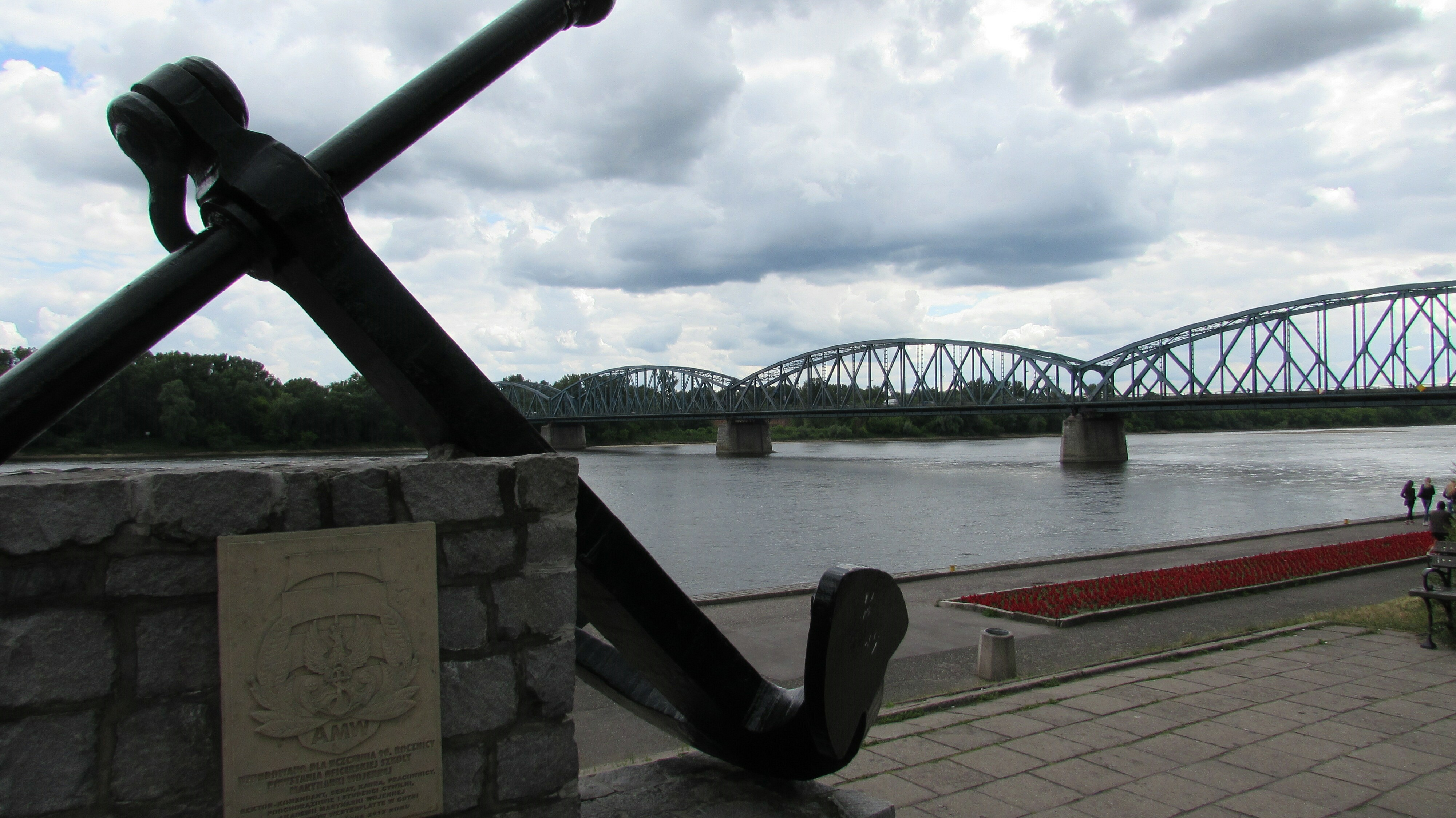 Torun Weichsel Jozef-Pilsudski-Brücke-2